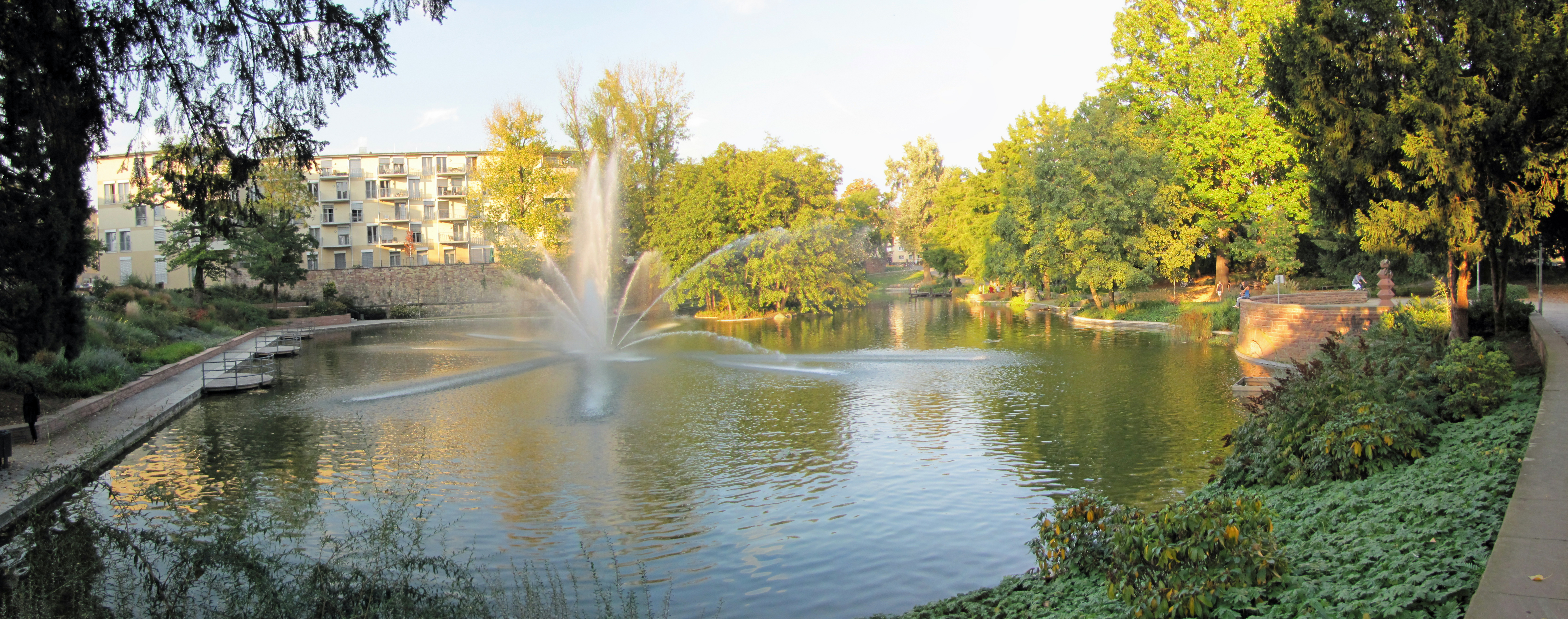 Der Rechneigrabenweiher in der Obermainanlage, in Ffm-Innenstadt.